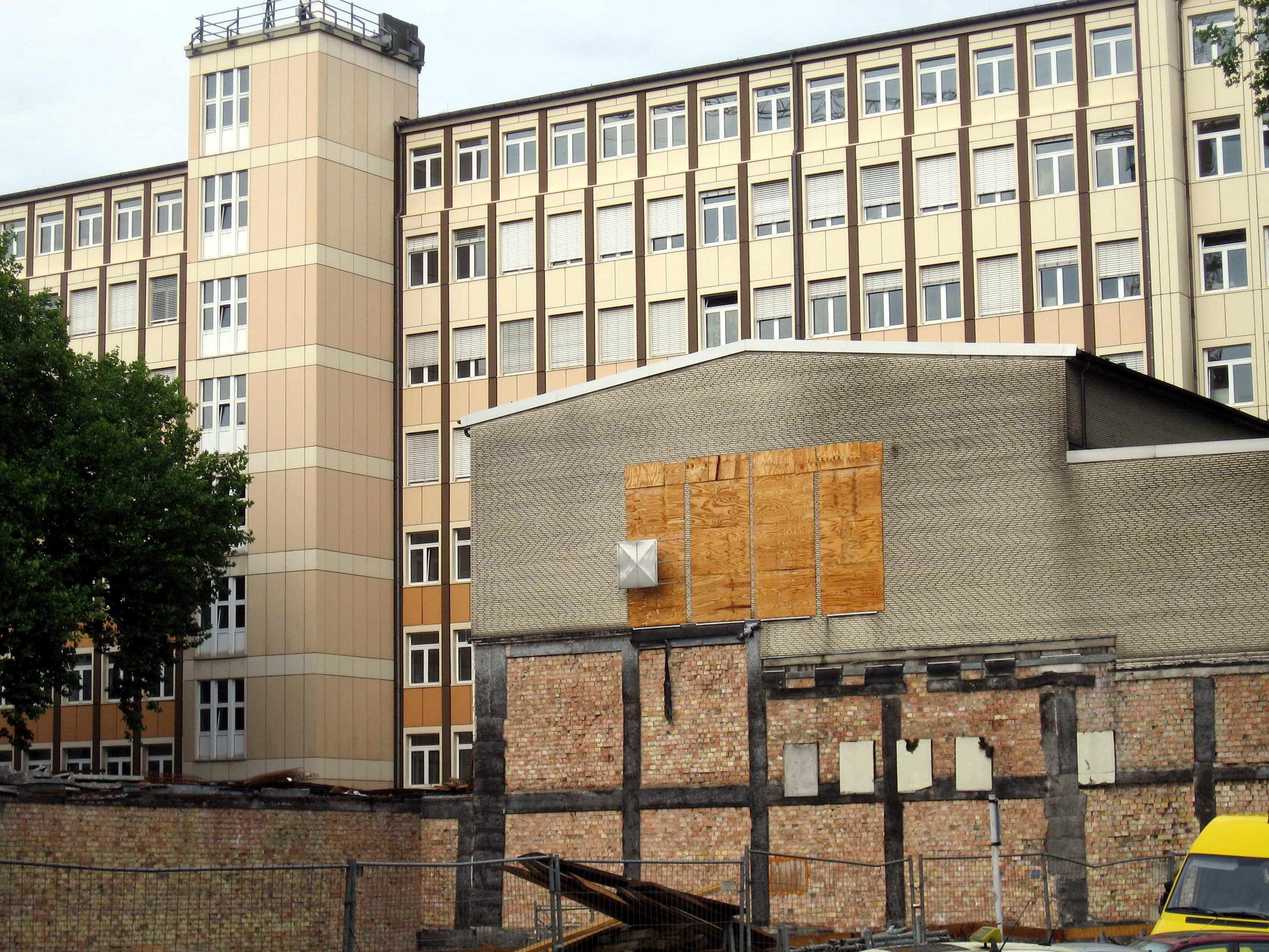 Dortmund, Kreuzviertel, Weisbachstraße, Fachhochschule, Umbau